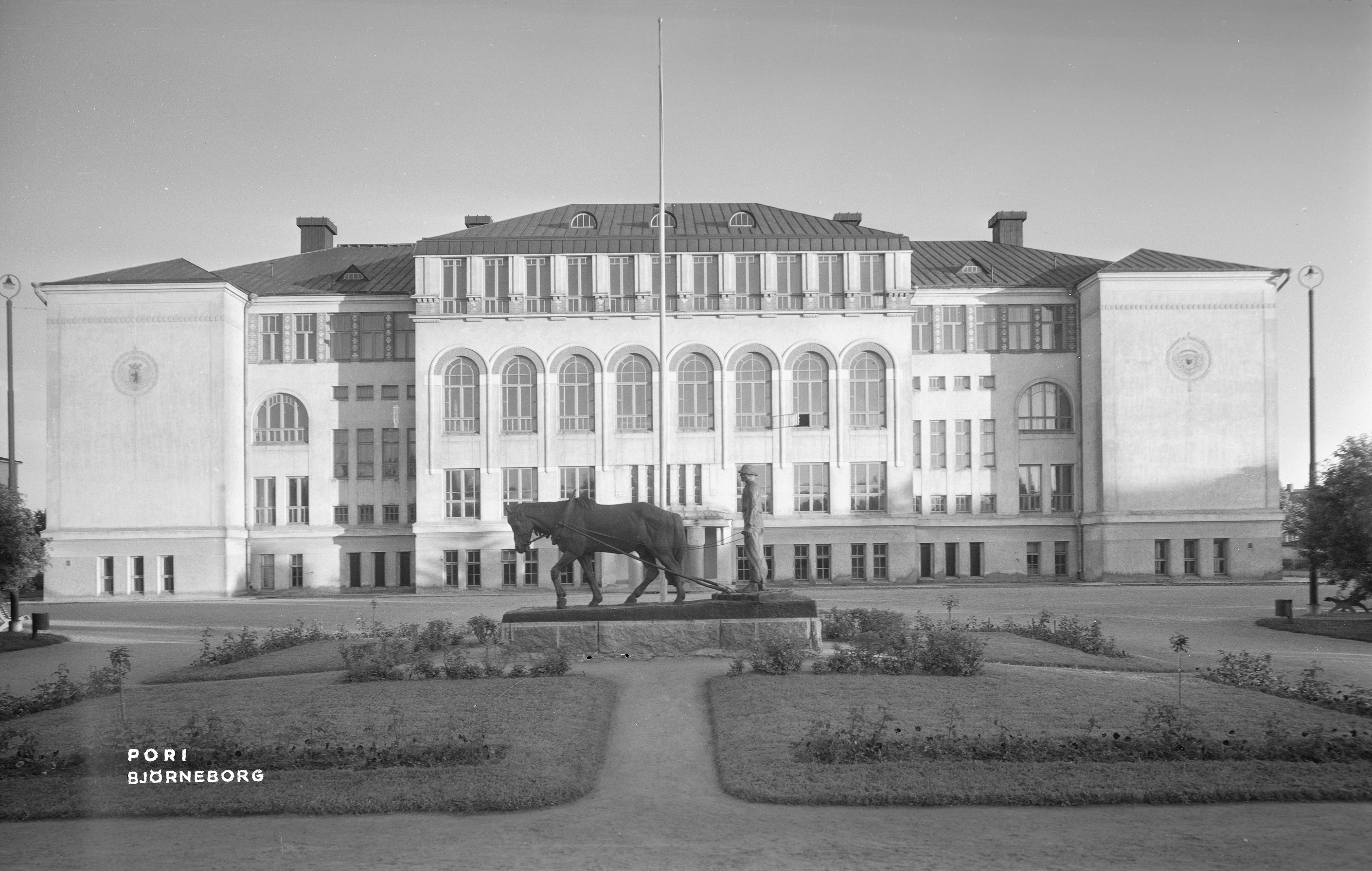 arkkitehti Usko Nyströmin suunnittelema, vuonna 1912 valmistunut Cygnaeuksen kansakoulu ja sen edustalla Emil Cedercreutzin vuonna 1920 veistämä Äestäjä-patsas Porin Riihikedossa; vaaka, mustavalkoinen